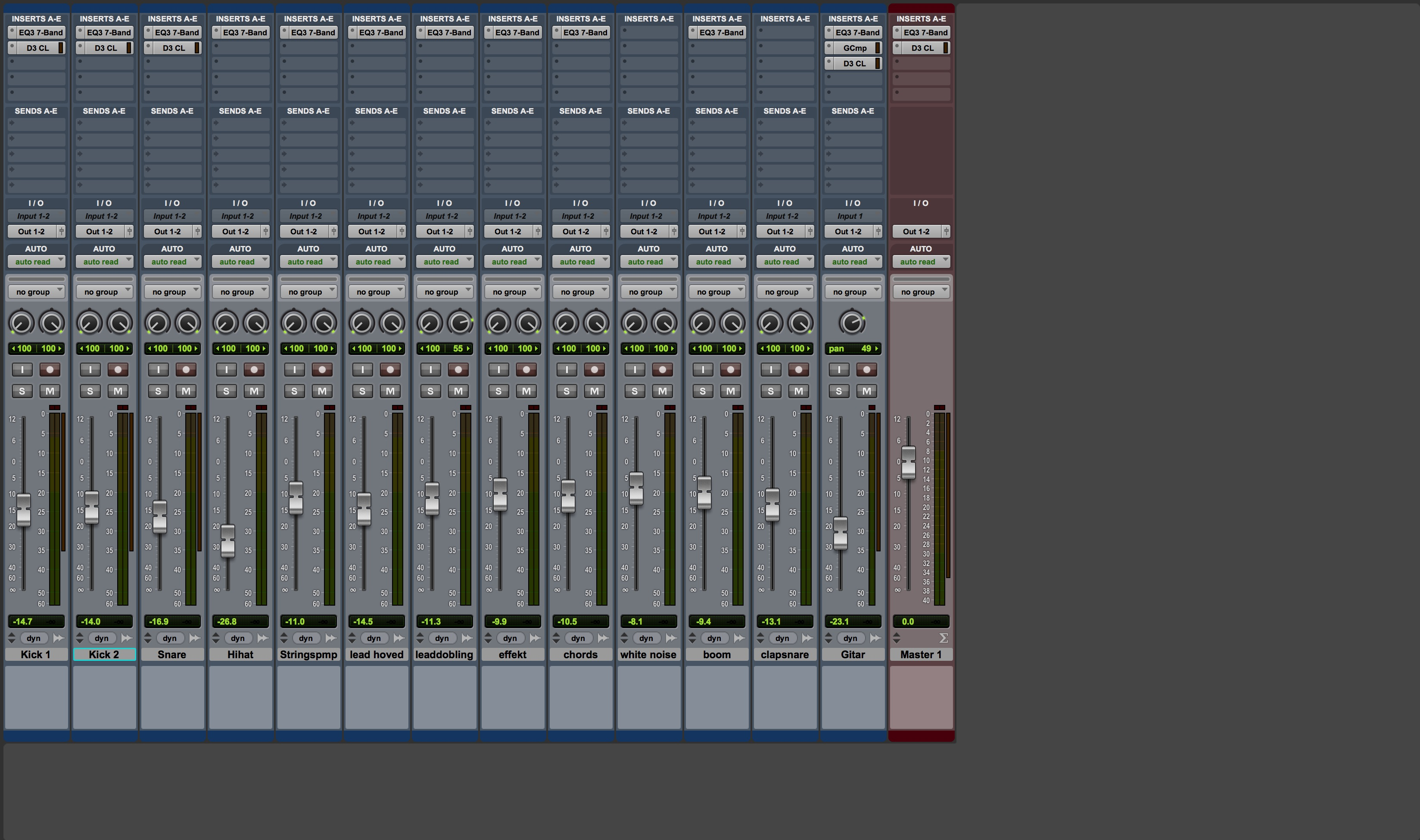 Så her ser mix fönster ut